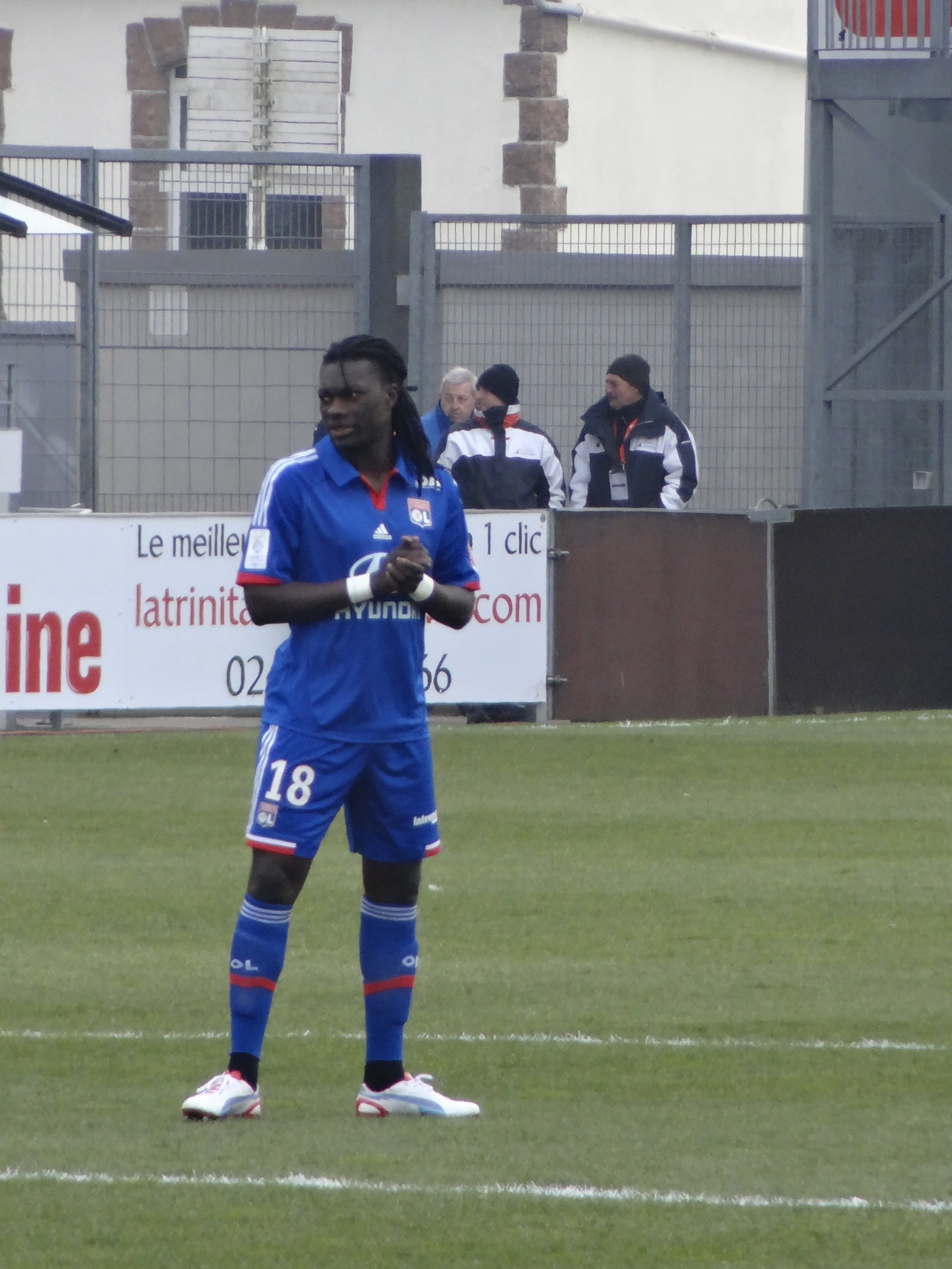 Match de football (Ligue 1) entre le Stade brestois 29 et l'Olympique lyonnais, le 3 mars 2013